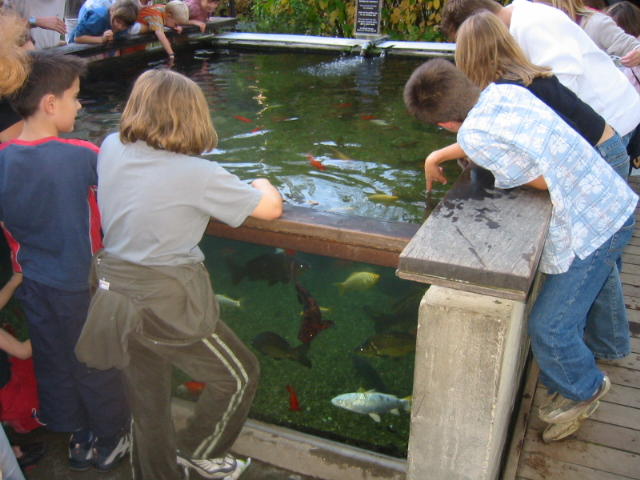 Aquarium exterieur de la Citadelle de Besancon (France)